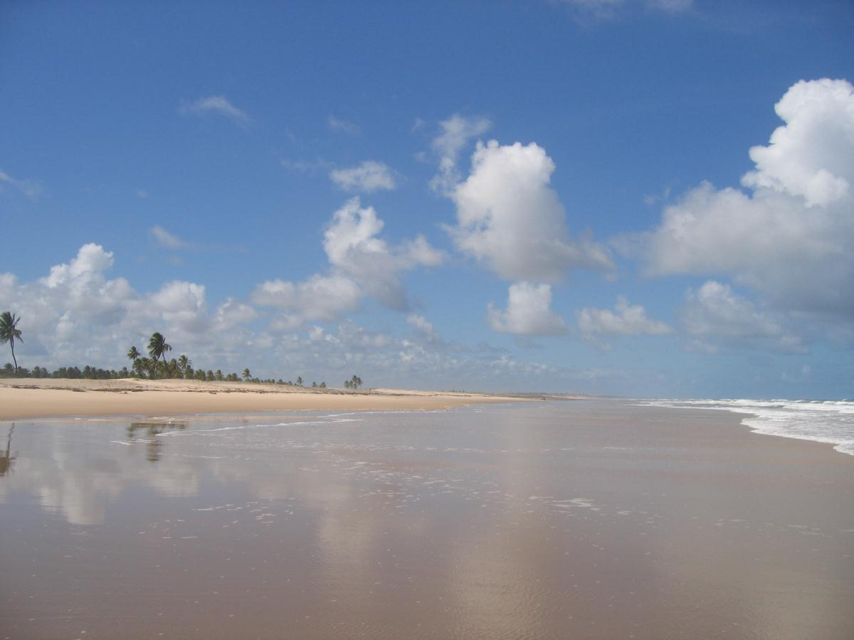 Mangue Seco Praia, Bahia, Brasil